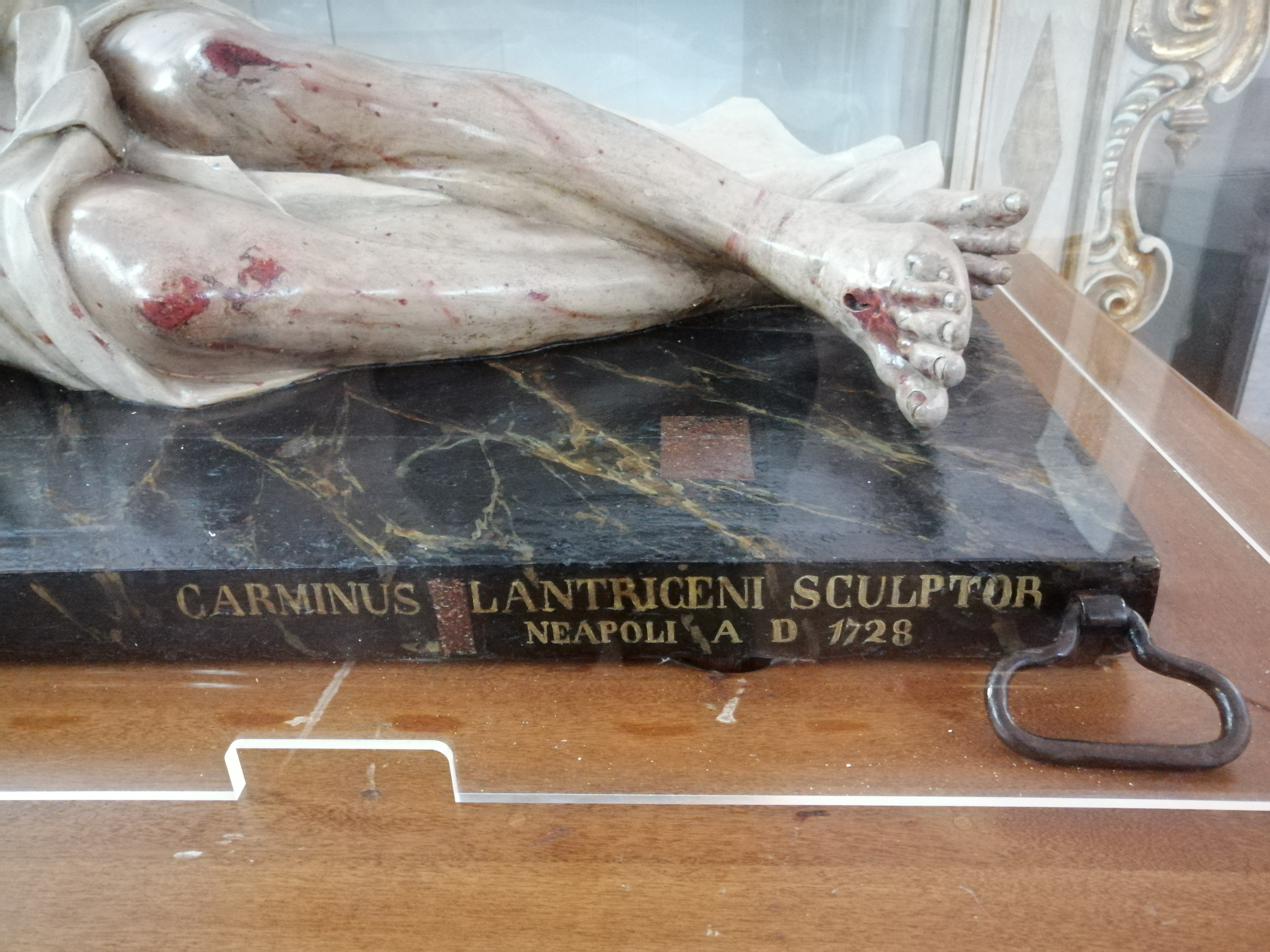 Scultura lignea del Cristo morto, opera di Carmine Lantriceni (1728), situata nella chiesa di San Tommaso d'Aquino, Congrega dei Turchini, a Procida. Particolare dei piedi e firma dell'autore.